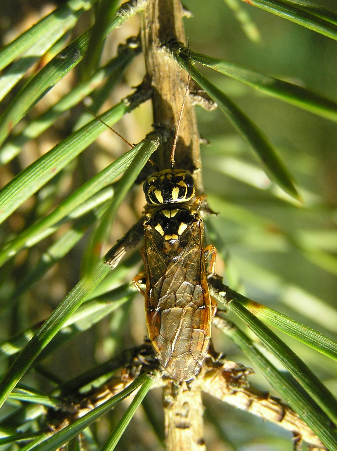 Acantholyda nemoralis, Osnuja gwiaździsta, Polska